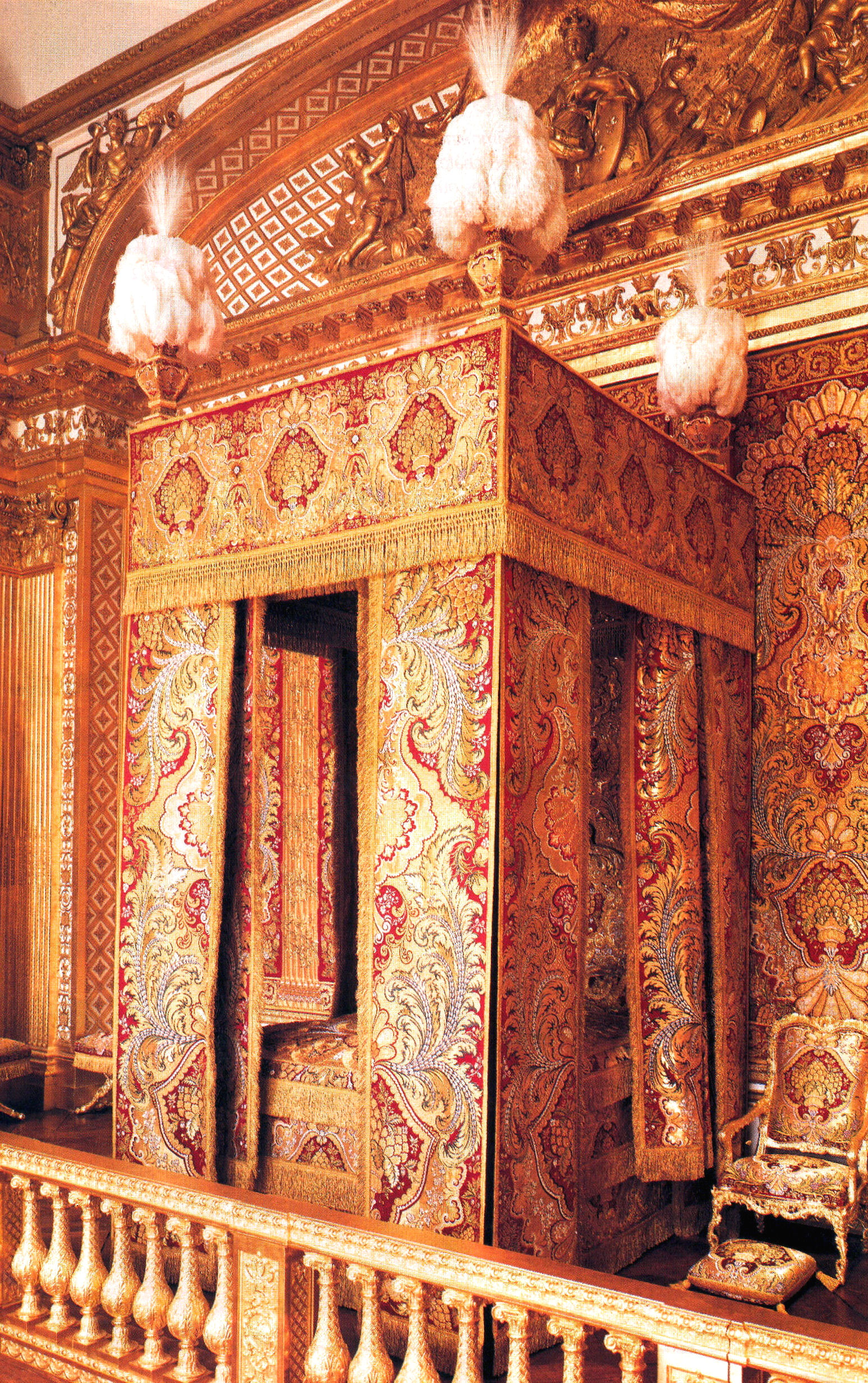 geen rechten meer wegens ouderdom, eigen foto